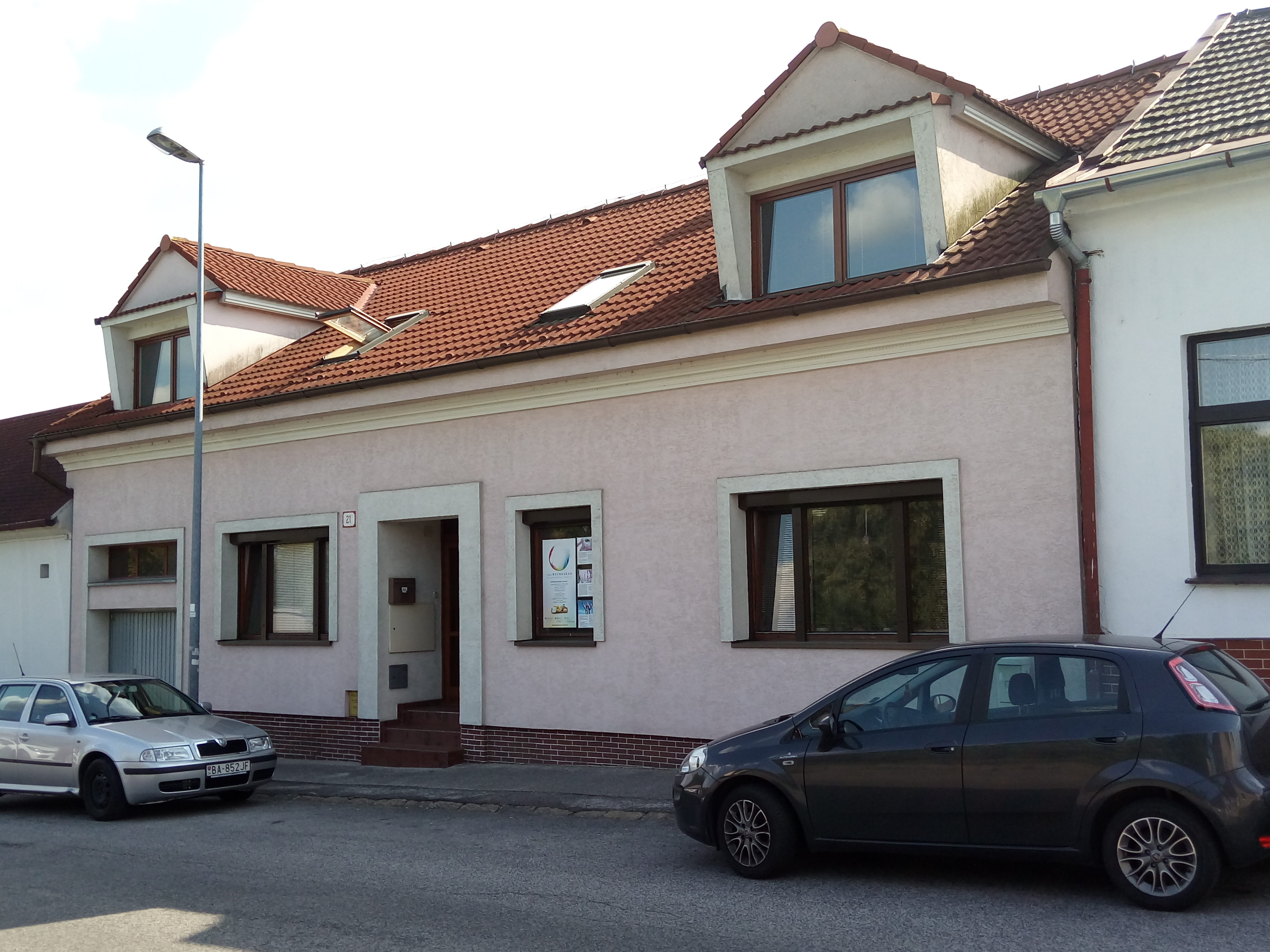 Smrečianska 21, Nové Mesto, Bratislava